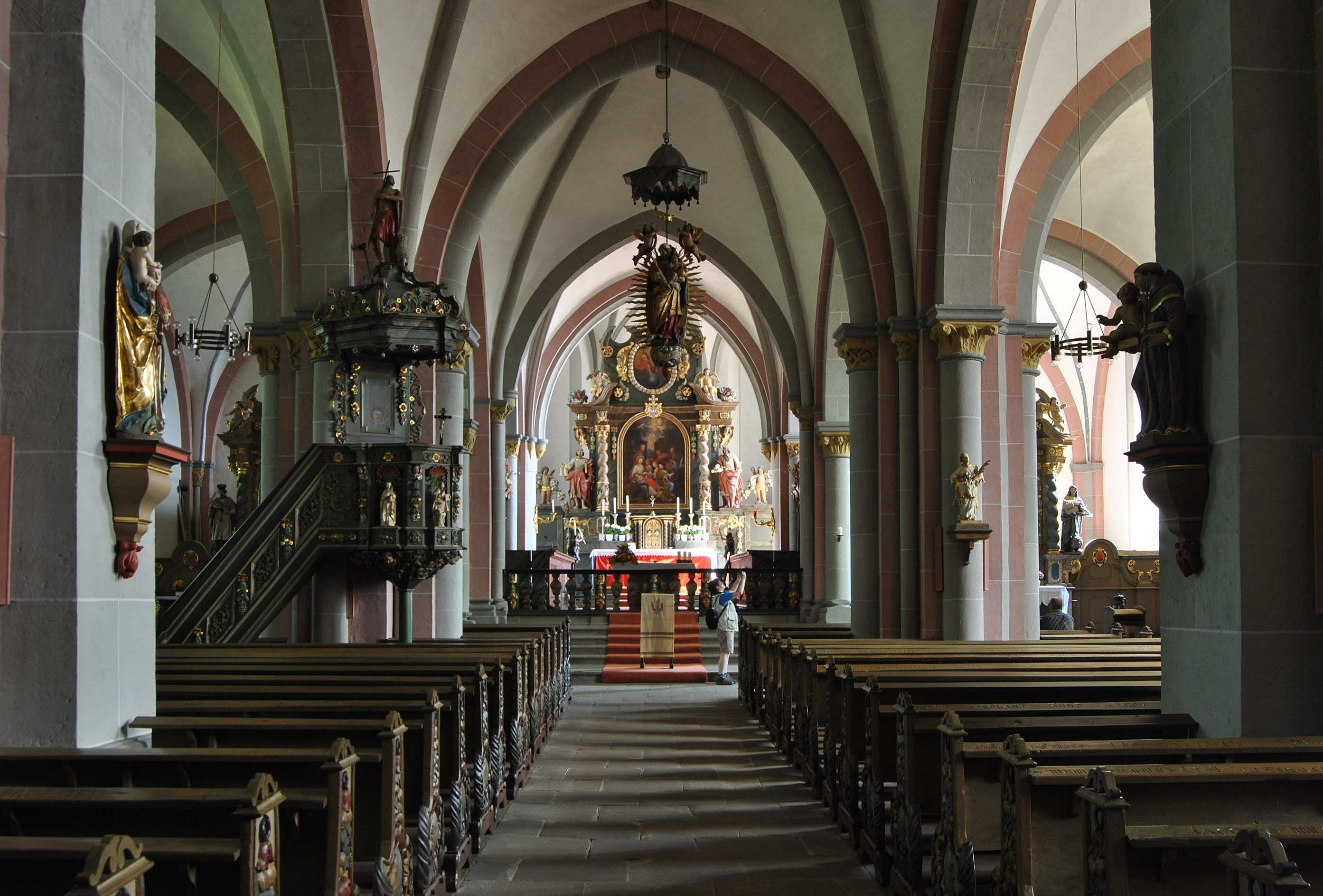 Marsberg (Nordrhein-Westfalen) – Obermarsberg – Stiftskirche St. Petrus und Paulus – Innenansicht This image shows a heritage building in Germany, located in the North Rhine-Westphalian city Marsberg (no. 15). This photograph was taken with a Nikon D3000